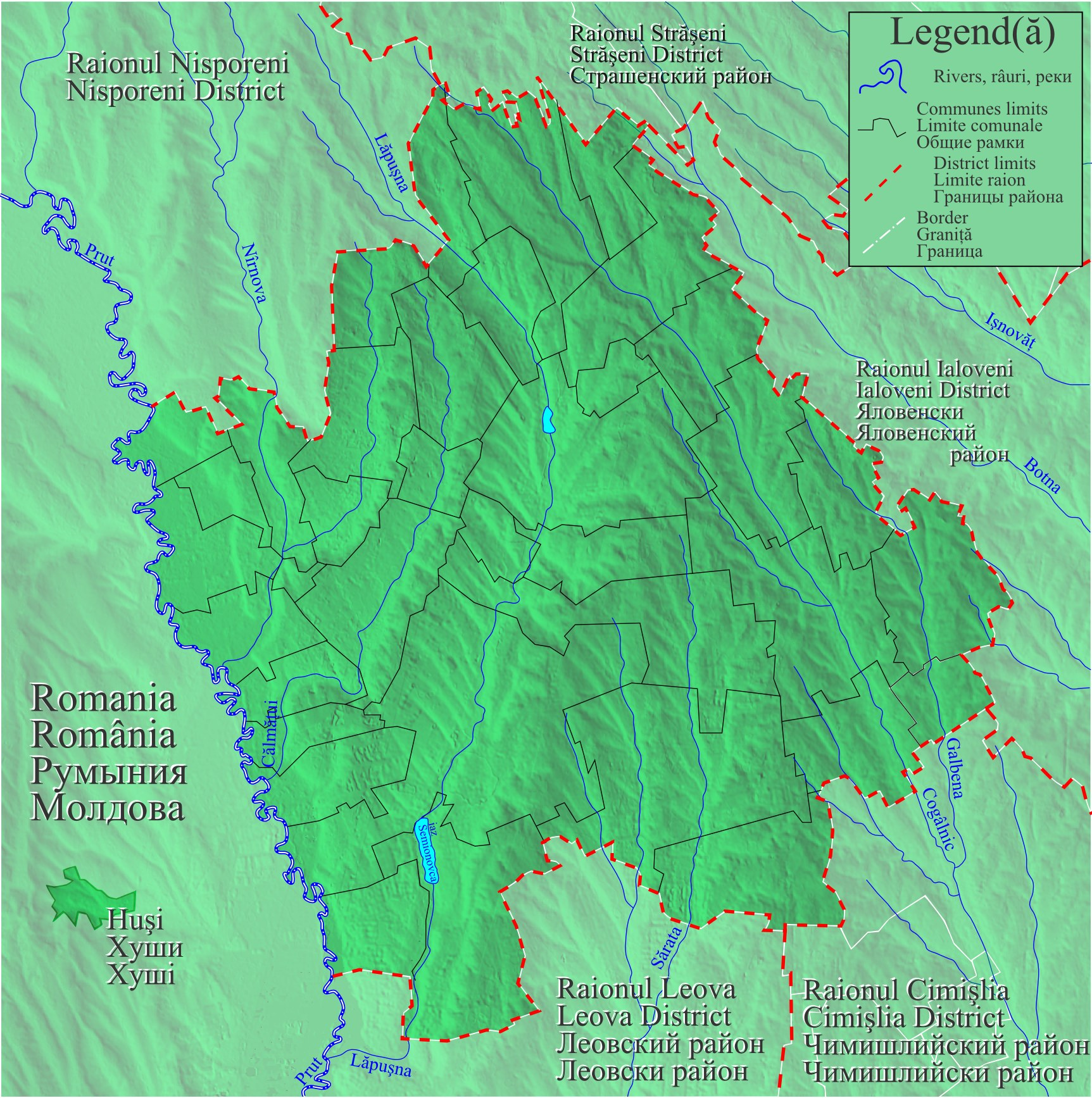 Harta de localizare Moldova Hincesti.